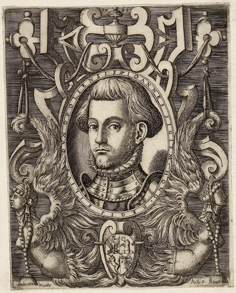 Grafik aus dem Klebeband Nr. 1 der Fürstlich Waldeckschen Hofbibliothek Arolsen Motiv: Johann Sigismund Zápolya